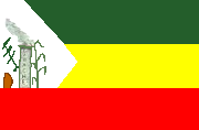 Bandera del municipio Carache del estado Trujillo, Venezuela